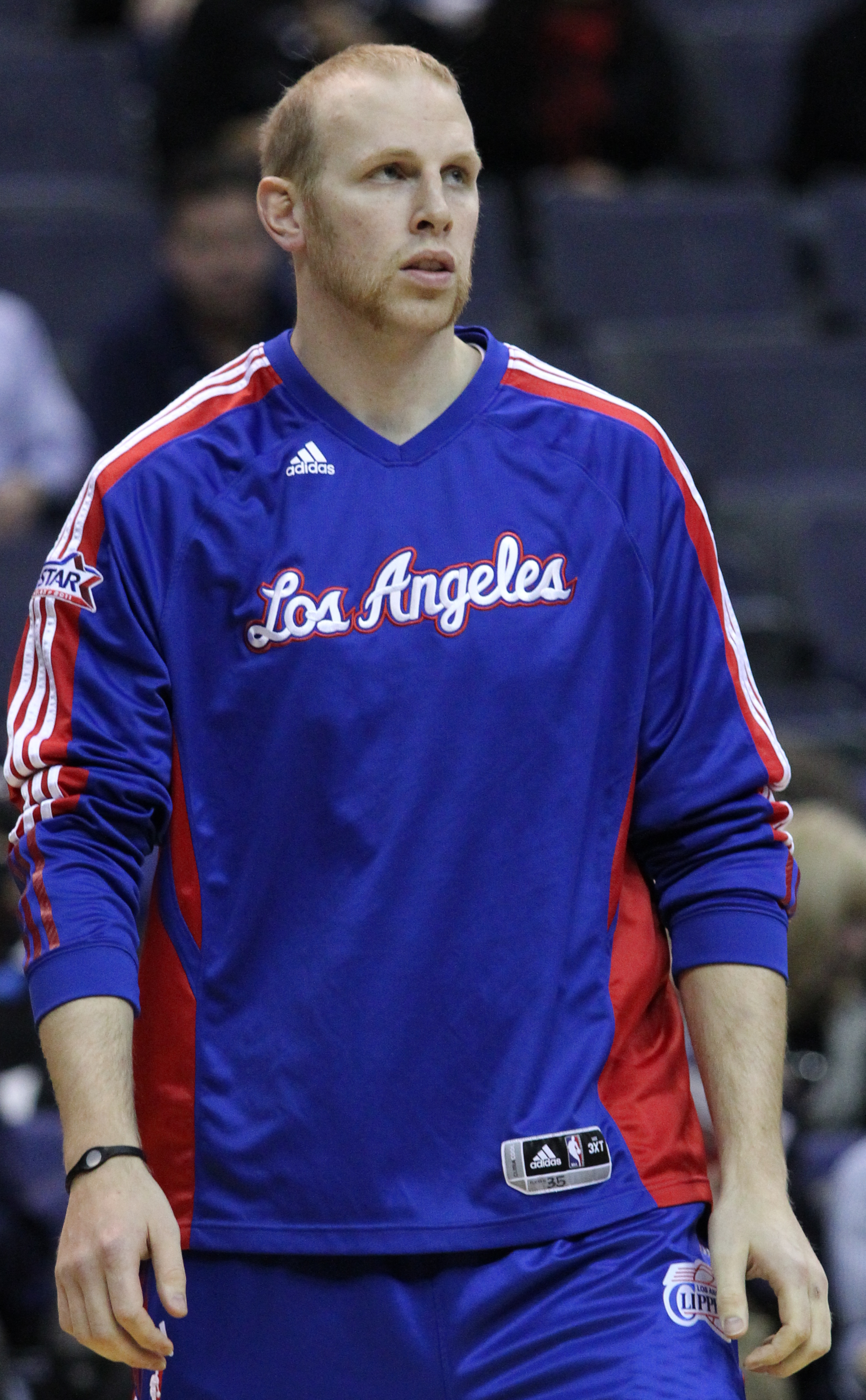 Wizards v/s Clippers 03/12/11